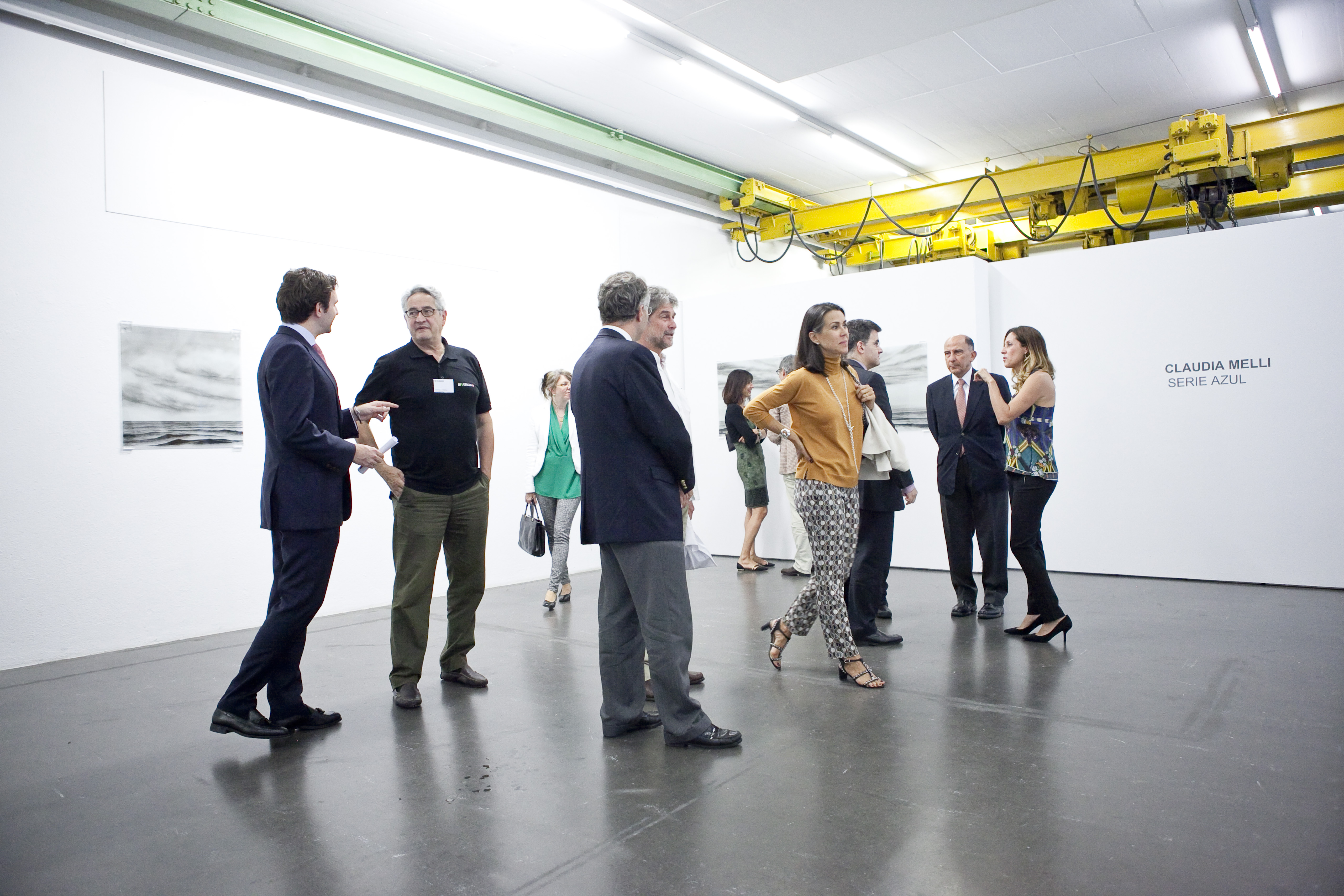 Ausstellungseröffnung Claudia Melli und Joao de Orelans e Bragança